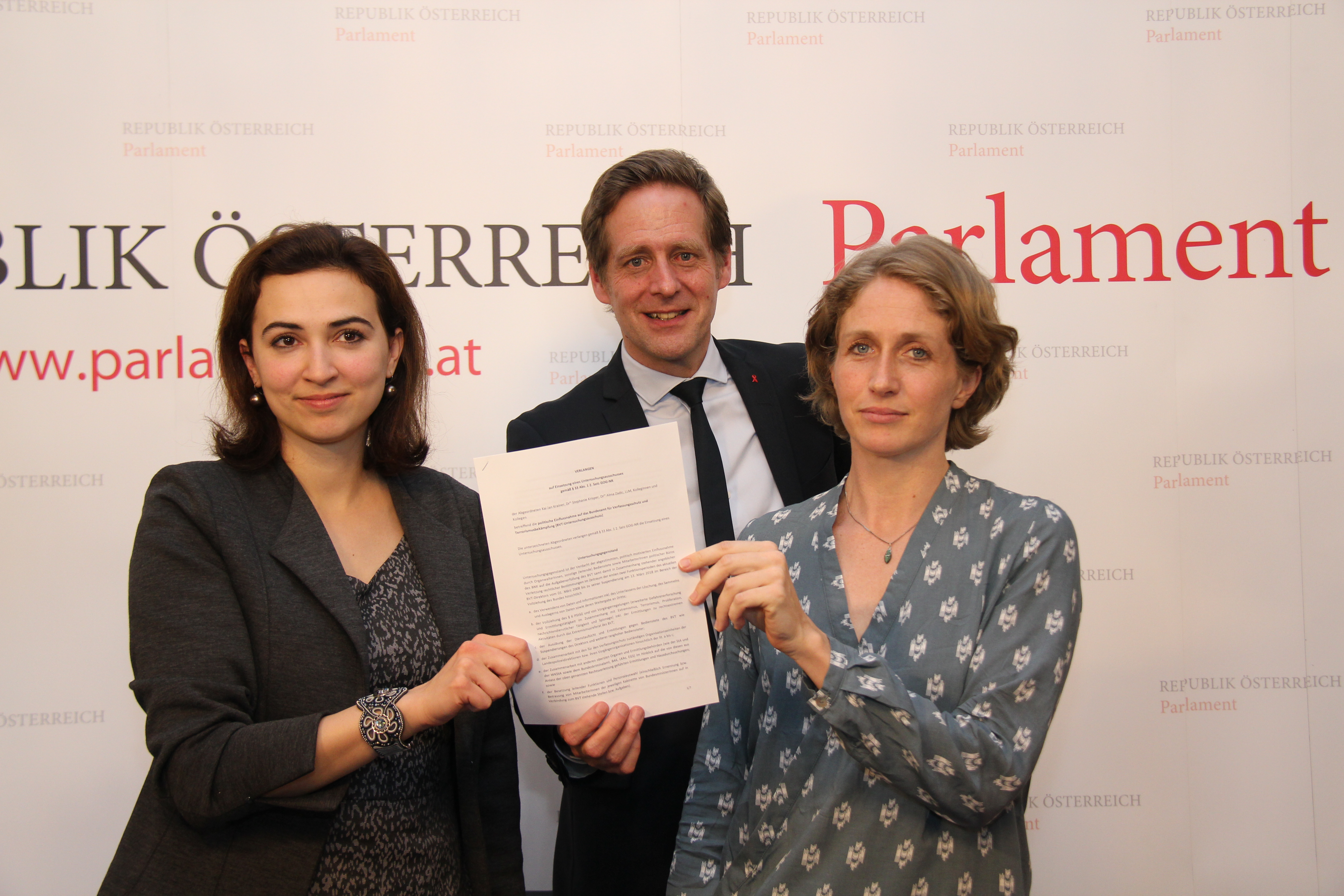 Präsentation Antrag U-Ausschuss Krainer mit NEOS und Liste Pilz